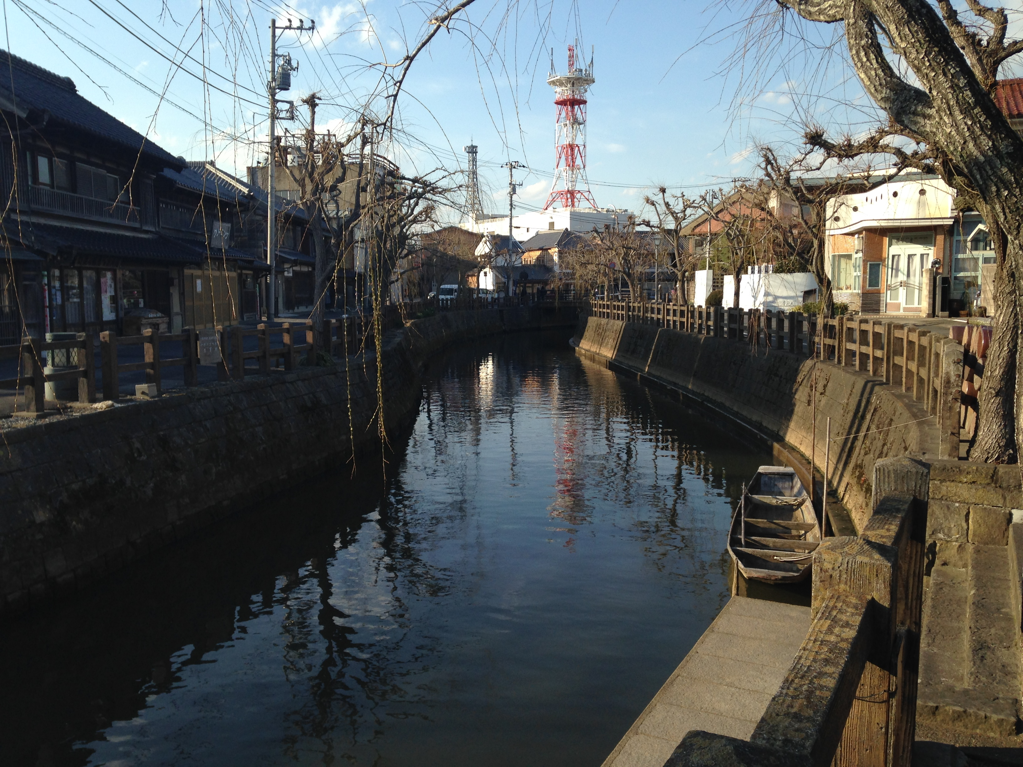 香取市佐原を流れる小野川(下流側)